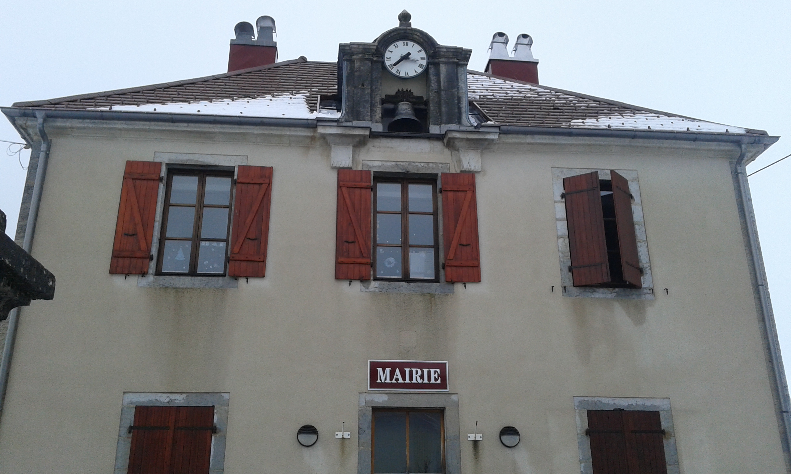 La mairie de Chalesmes (39)